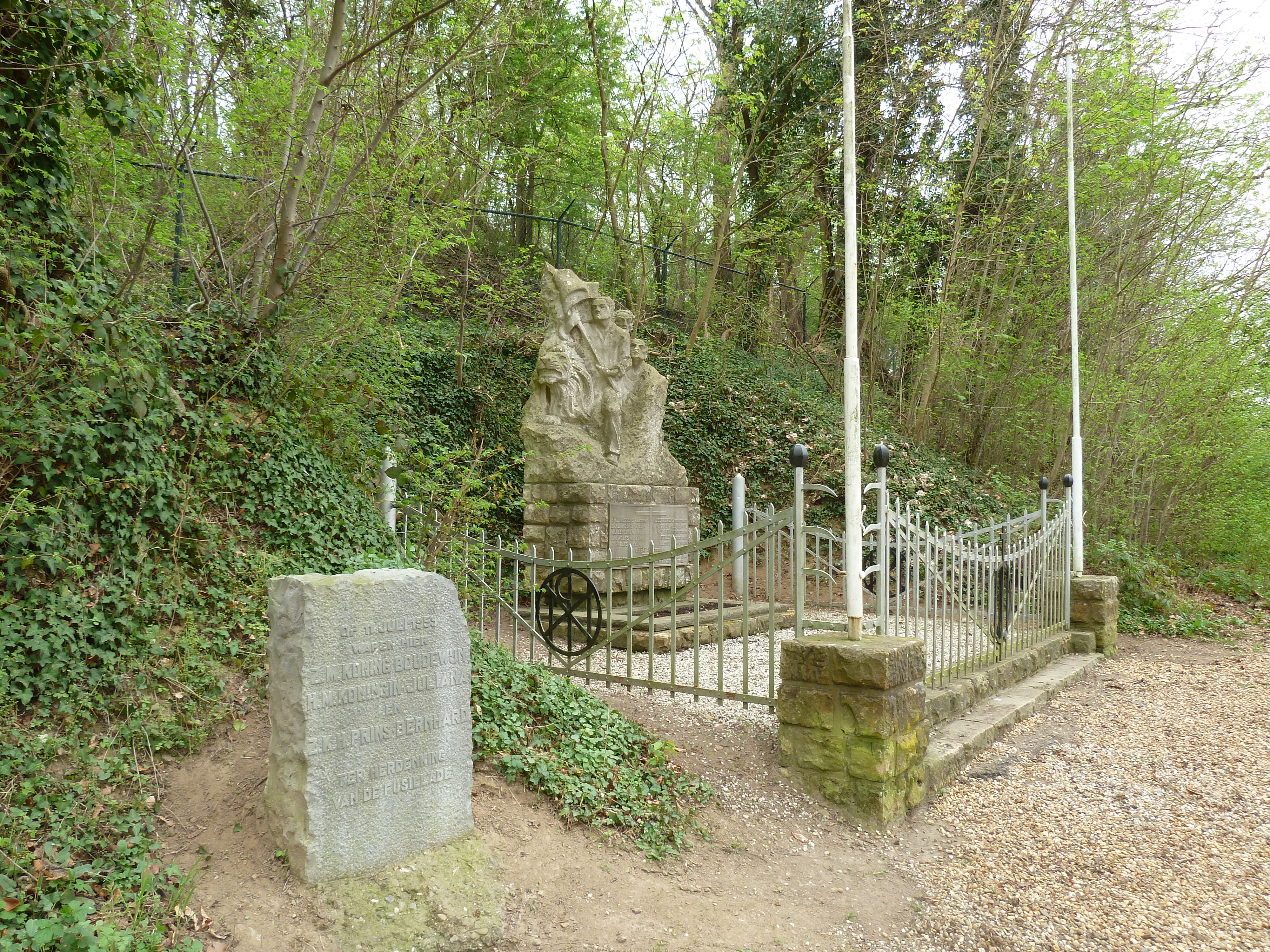 Vlaams + Belgisch monument, Cadier en Keer, Limburg, Nederland